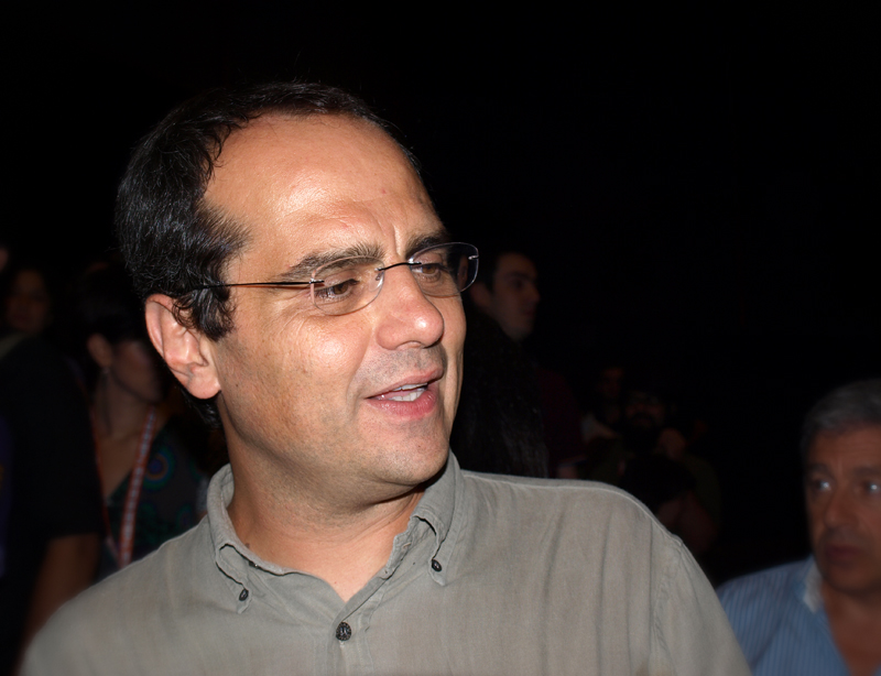 RFF - Serata Boris 3 0010 - Luca Vendruscolo